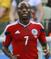 Pablo Armero This file has been extracted from another file: Brazil and Colombia match at the FIFA World Cup 2014-07-04 (9).jpg